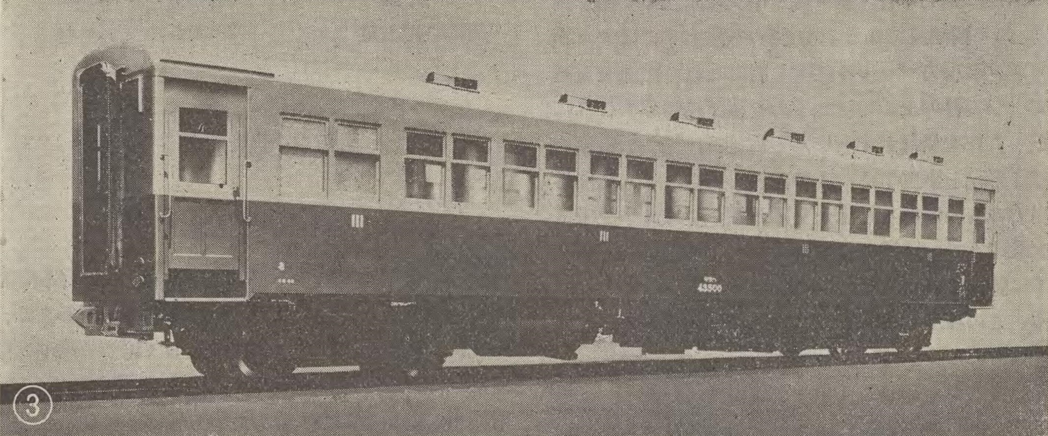 キサハ43500形（キハ43000形気動車の付随車）。